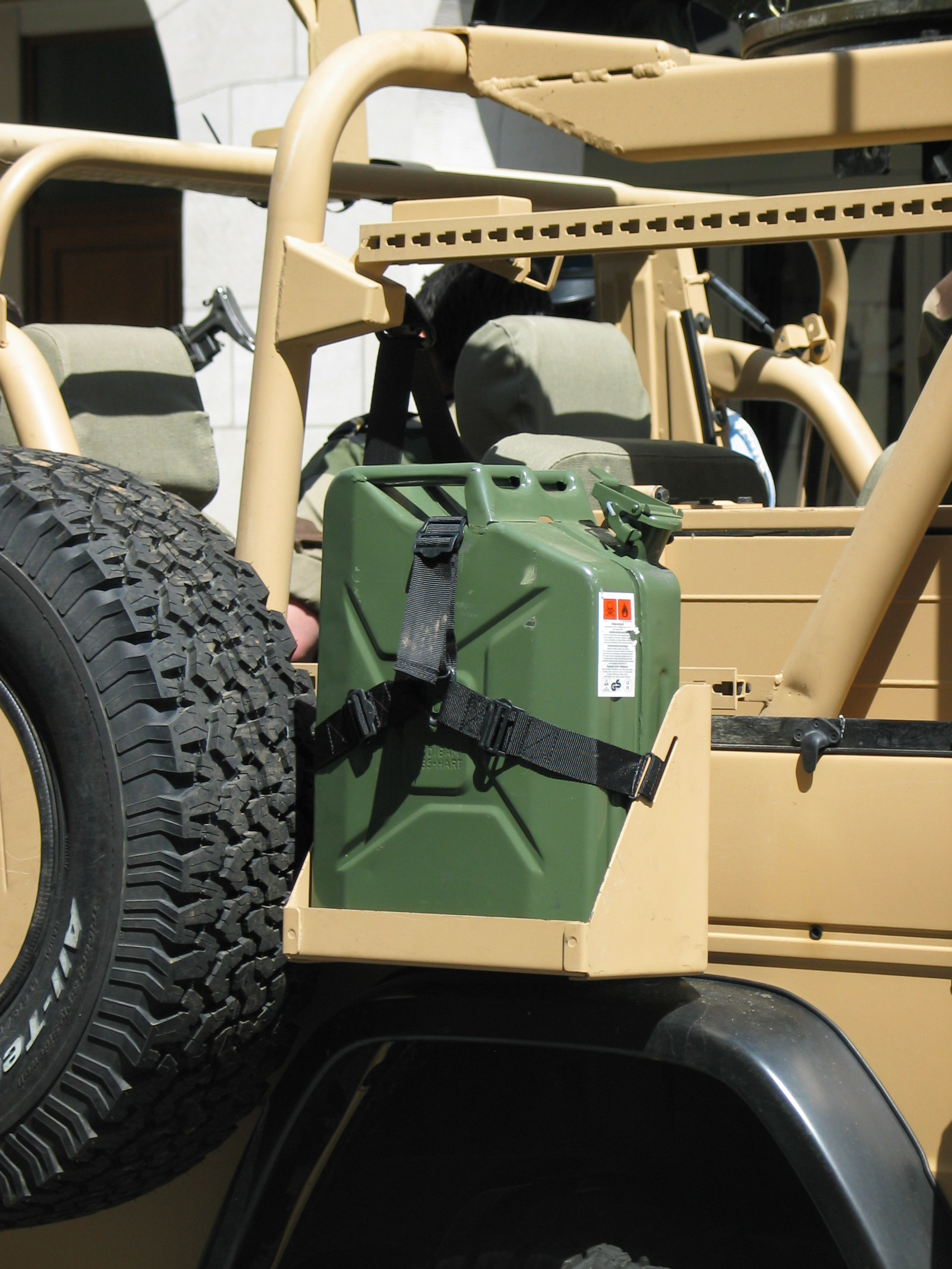 Un jerrican sur un véhicule militaire français.